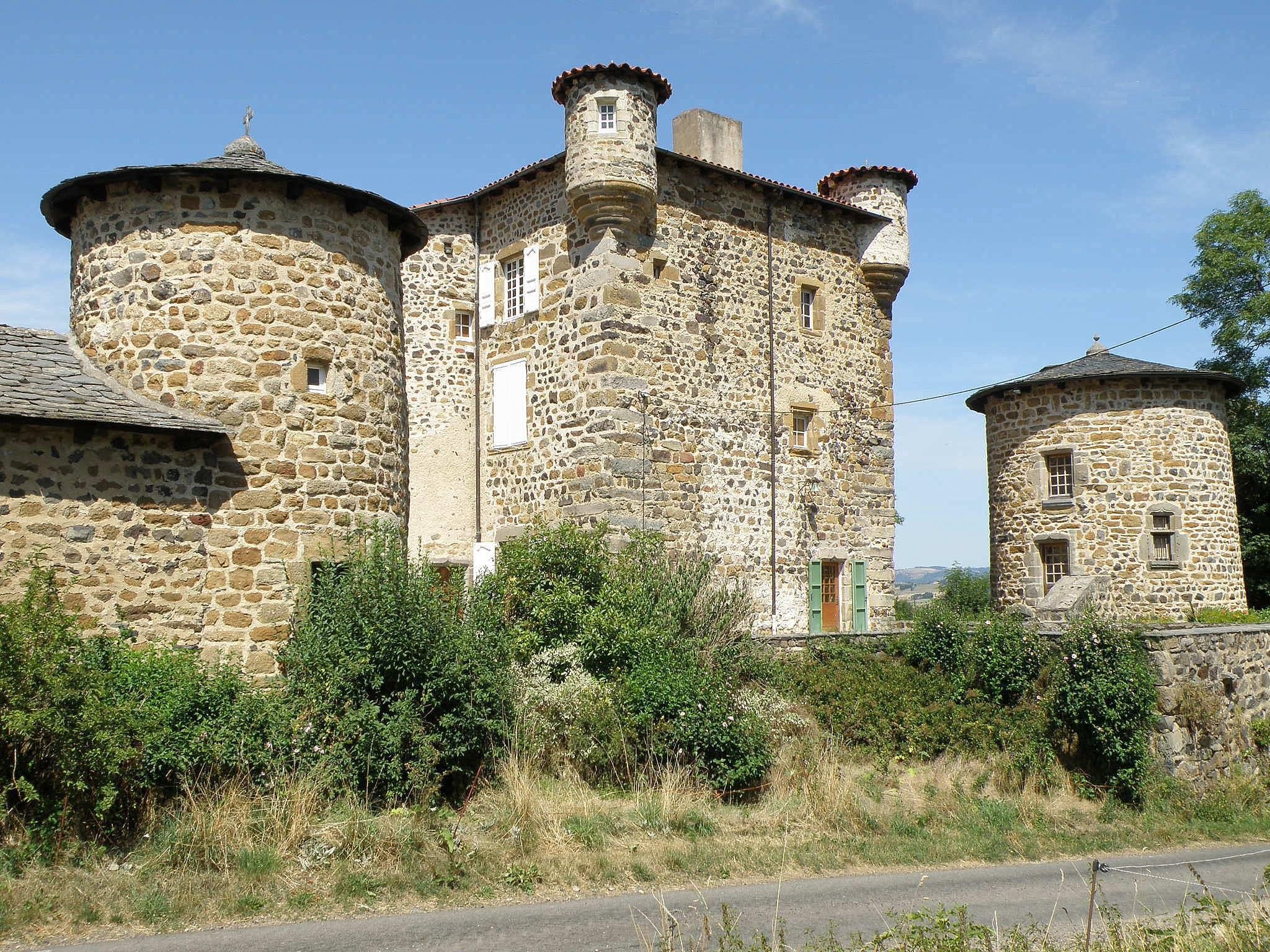 Retournac, dép. de la Haute-Loire, France (Auvergne). Castel de Mercuret, dans le sud de la commune. Corps de logis au centre, chapelle à gauche.